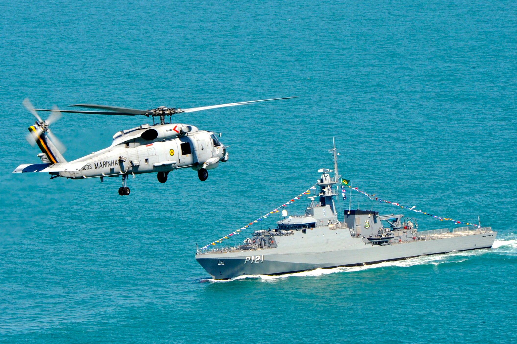 Arquivo liberado pela Marinha do Brasil através de projeto GLAM com Wiki Educação Brasil